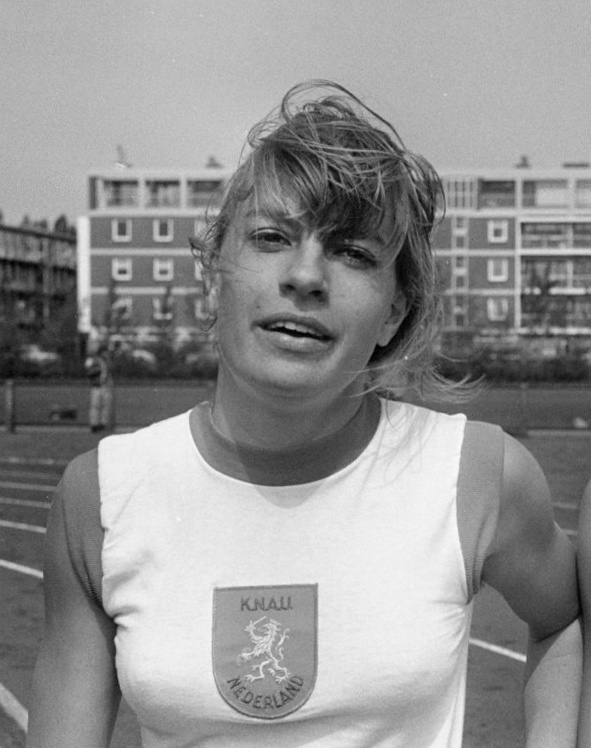 Dames atletiek Nederland tegen Engeland in Den Haag ; links Mieke Sterk